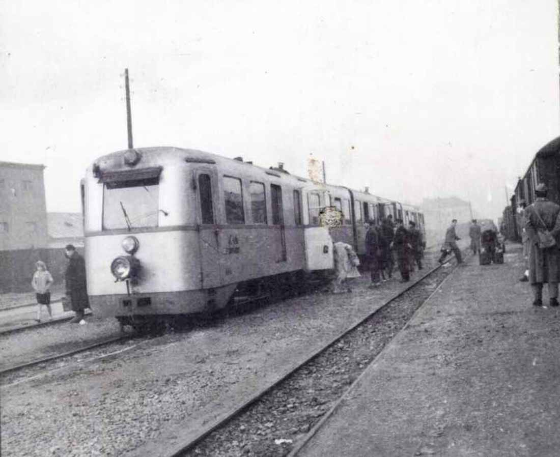 Schmalspurtriebzüge JDŽ-Reihe 801 in Sarajevo